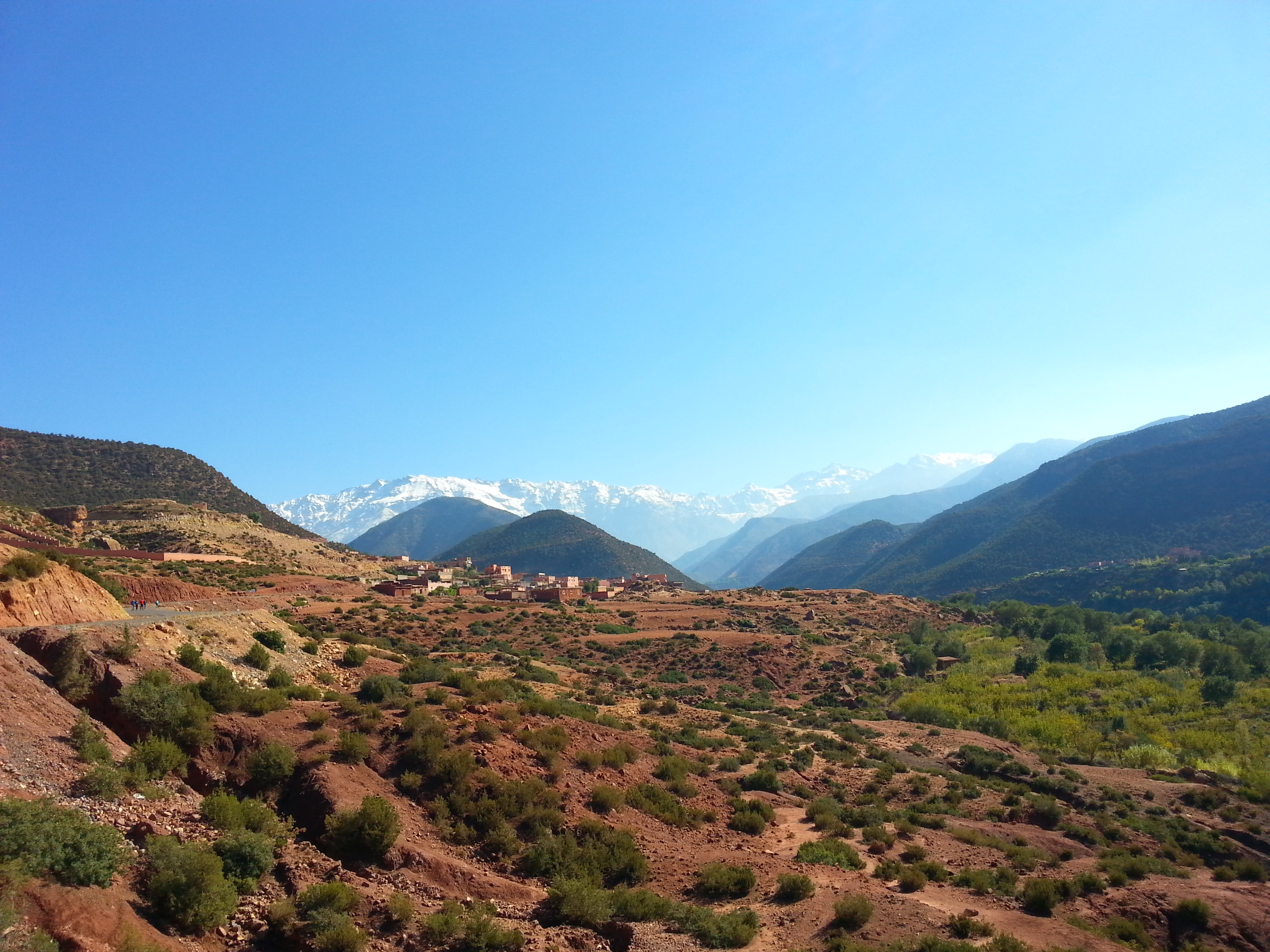 توبقال